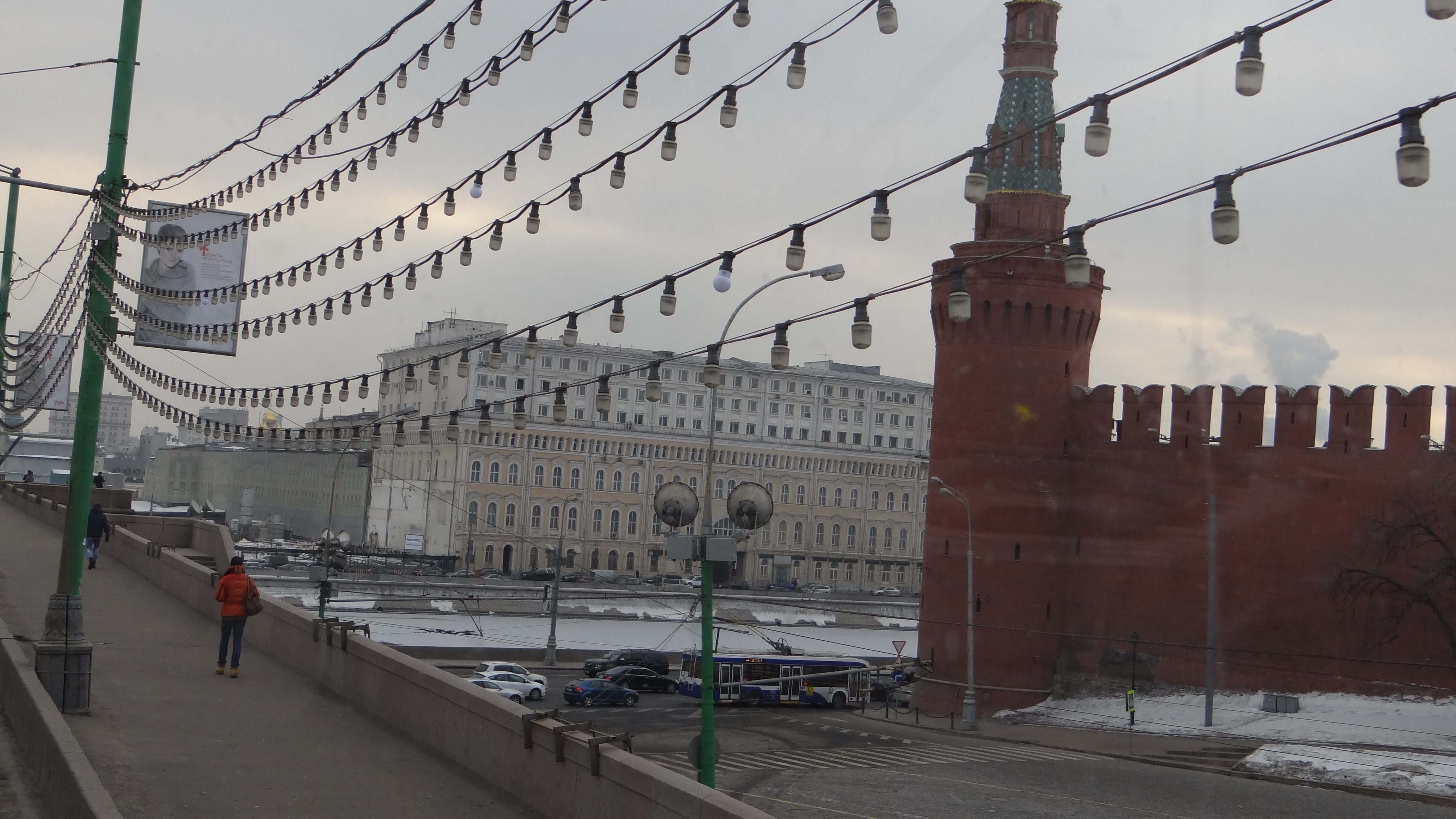 Boris Nemtsov - Lieu d'assasinat